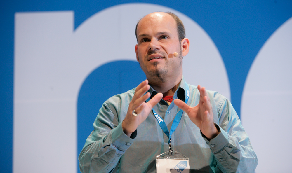 _T5P0968